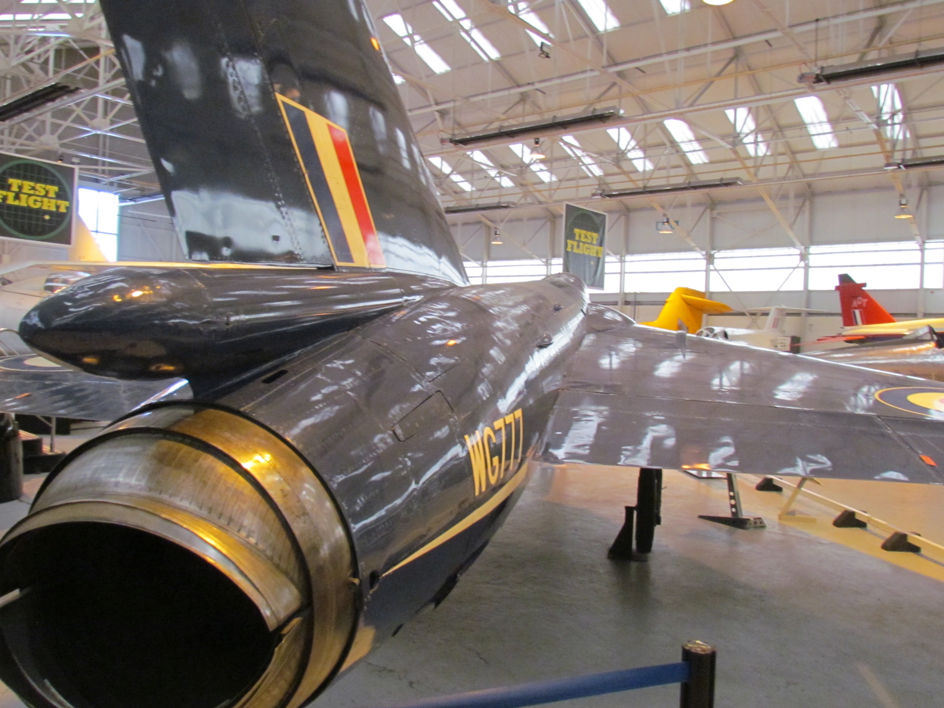 Fairy Delta 23